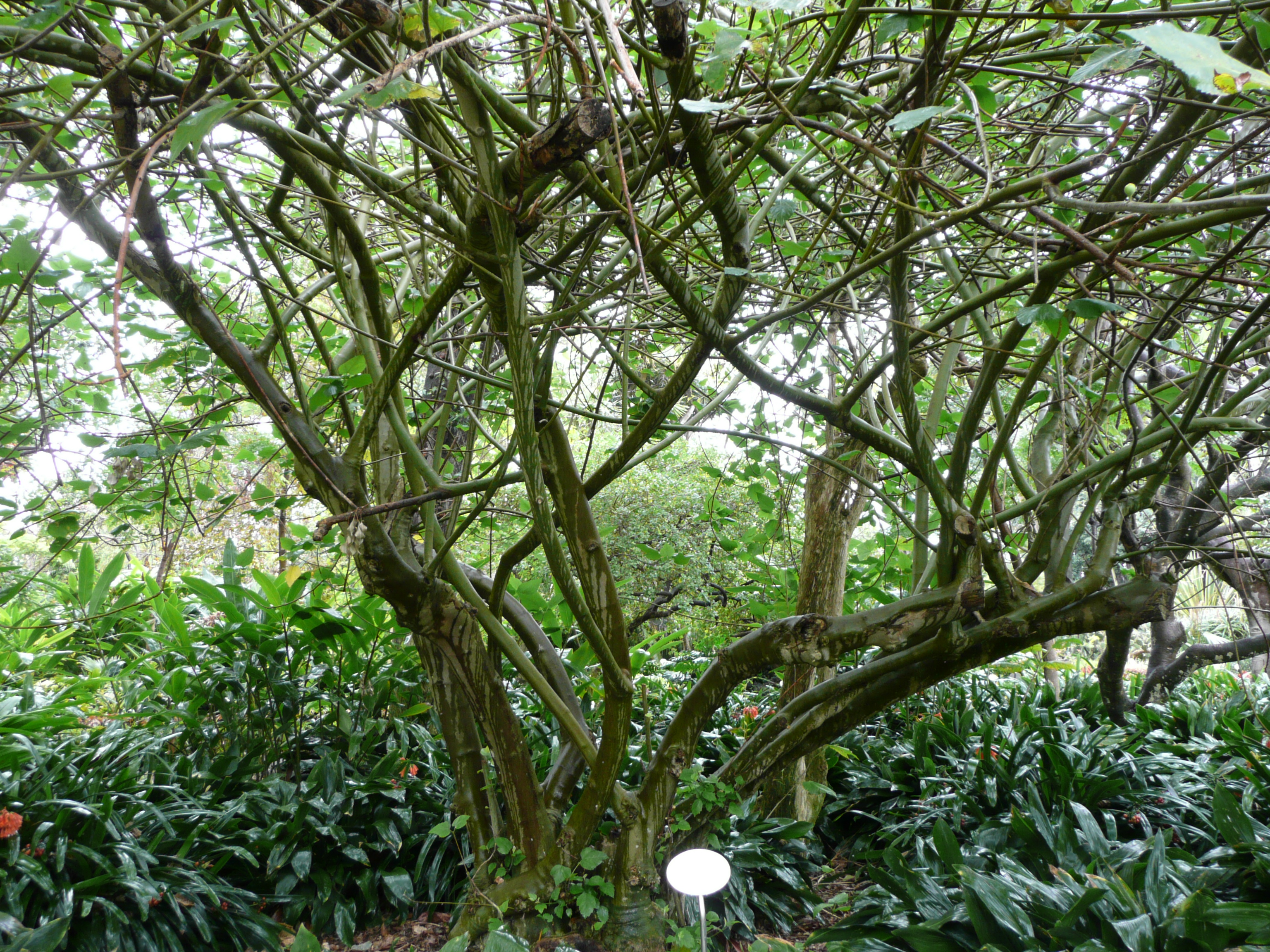 Ficus palmata in Jardín de Aclimatación de la Orotava Map: 28° 24' 39" N, 16° 32' 7" W